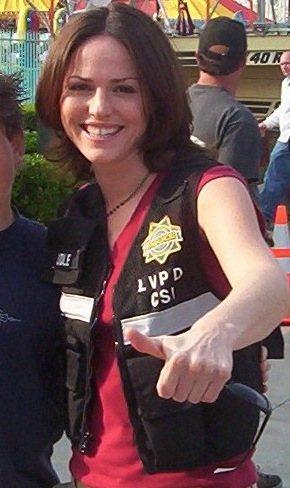 Actress Jorja Fox